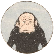 Illustration de Caramel : histoire d’un singe